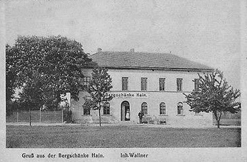 Die Bergschänke an der alten Poststraße in Hain